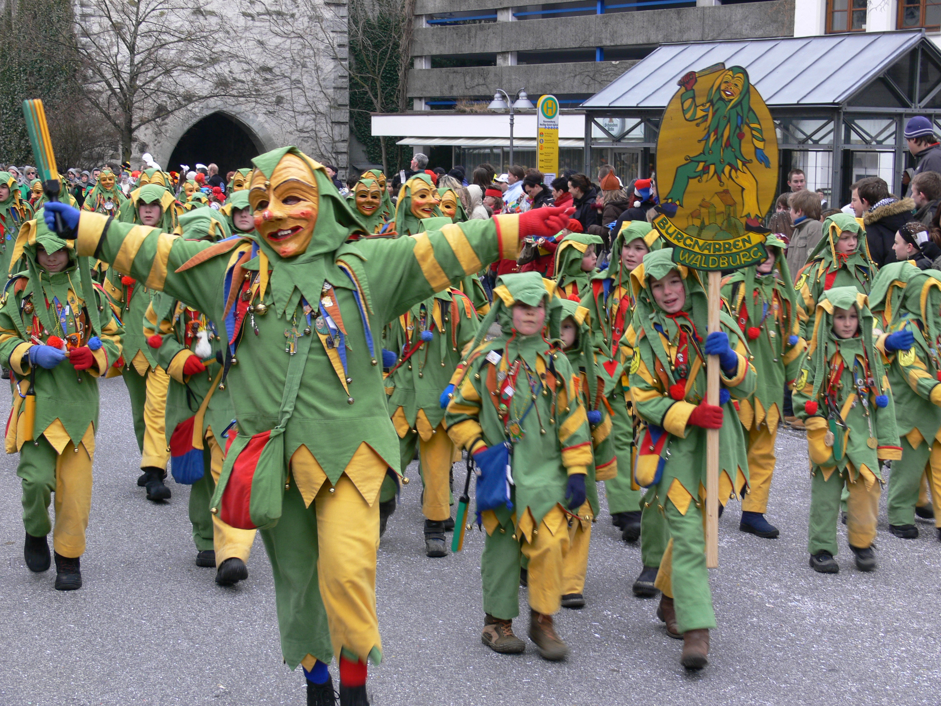 Narrensprung am Fasnetsmontag, 4. Februar 2008 in Ravensburg: Burgnarren Waldburg